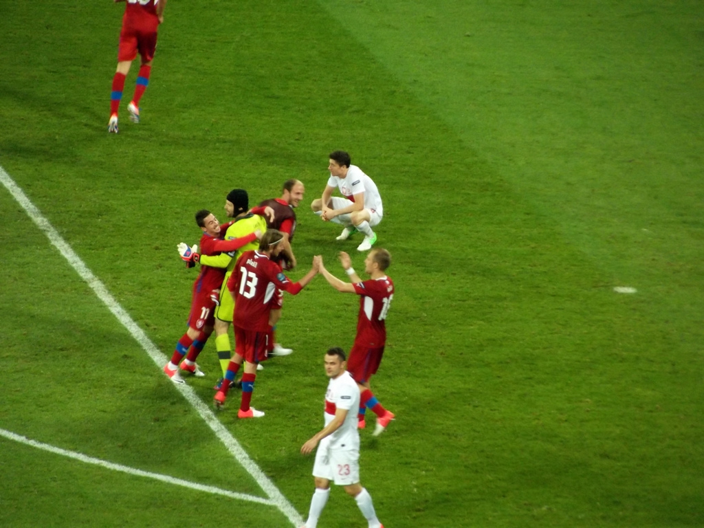 Czech joy after Czech Republic - Poland, UEFA Euro 2012.